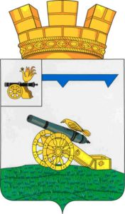 РИСУНОК ГЕРБА ВЯЗЕМСКОГО ГОРОДСКОГО ПОСЕЛЕНИЯ ВЯЗЕМСКОГО РАЙОНА СМОЛЕНСКОЙ ОБЛАСТИ (полный герб)